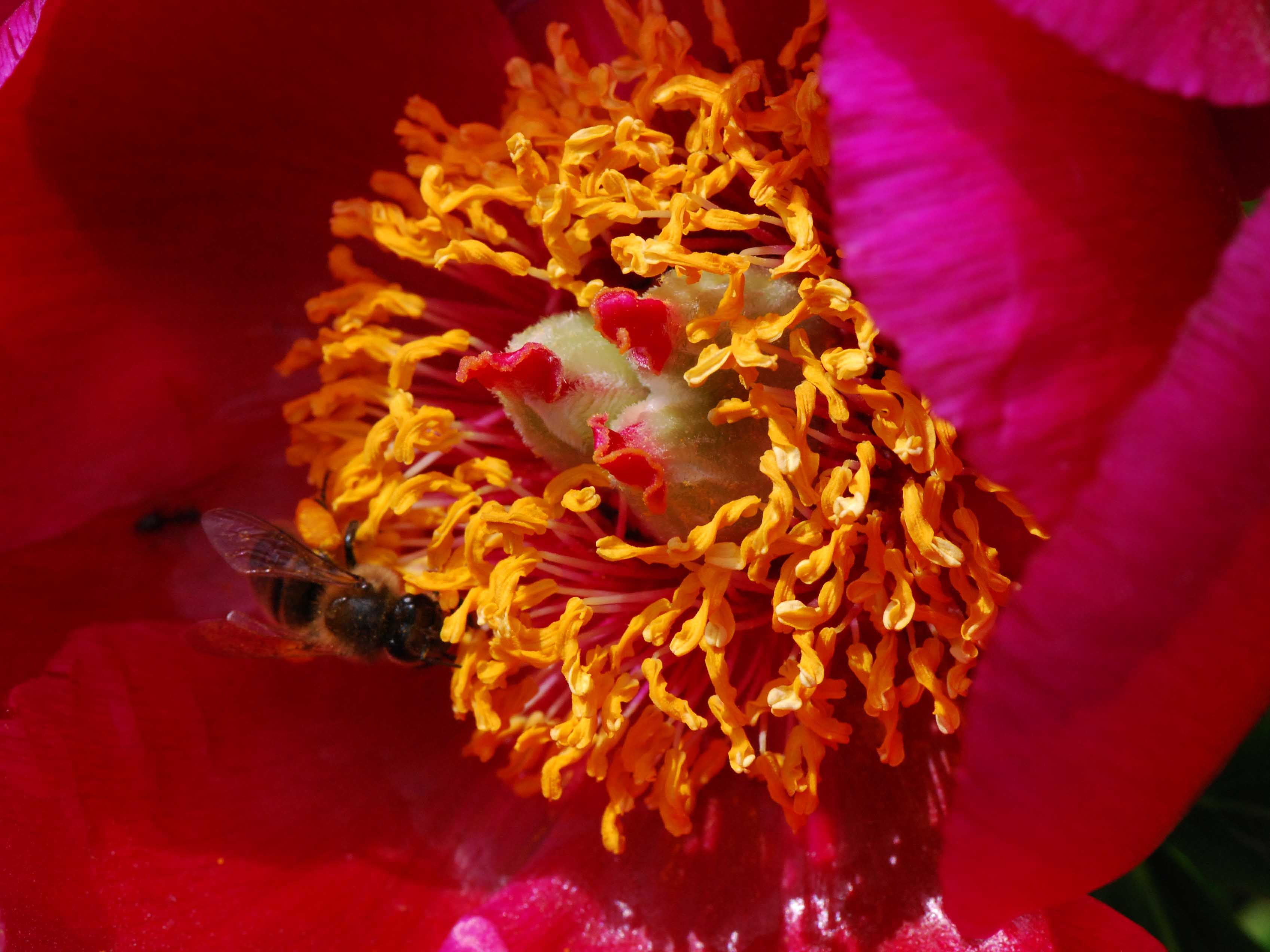 Paeonis officinalis subsp officinalis, fleur, Jardin des Plantes de Paris